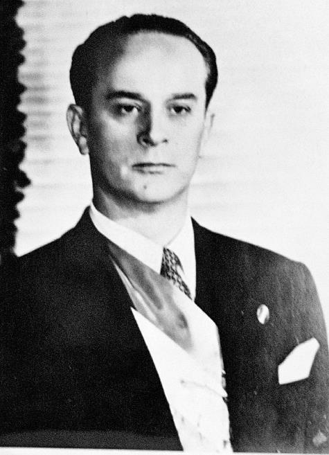 Jacobo Arbenz Guzman (oficial)